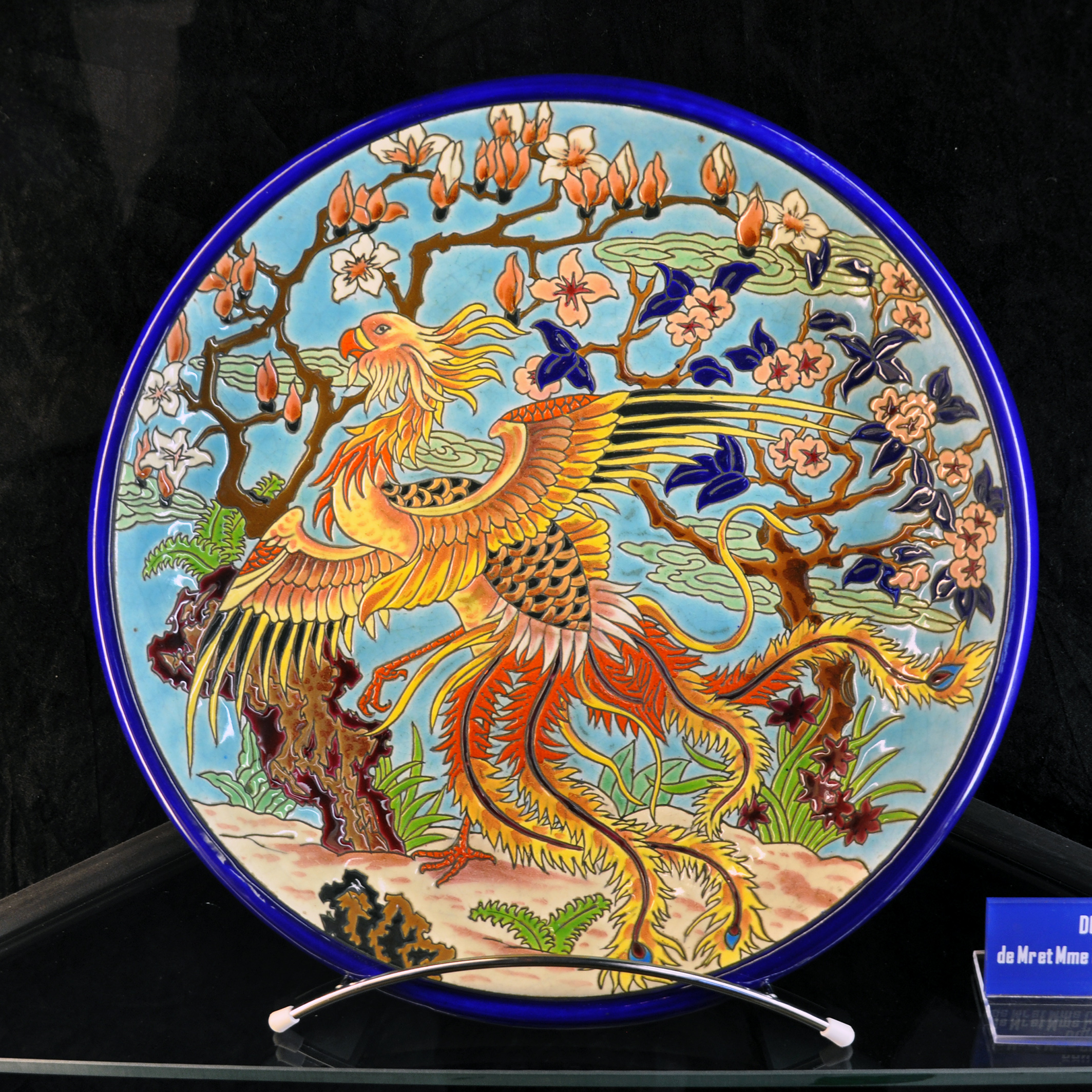 Plat à décor de phénix, émaux de Longwy. Musée municipal de Longwy.